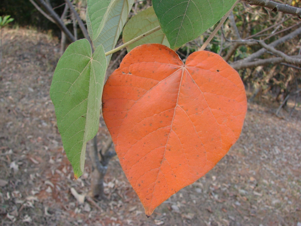 Croton urucurana - EUPHORBIACEAE - Parque Olhos D'Água - Brasília - Distrito Federal - Brasil.